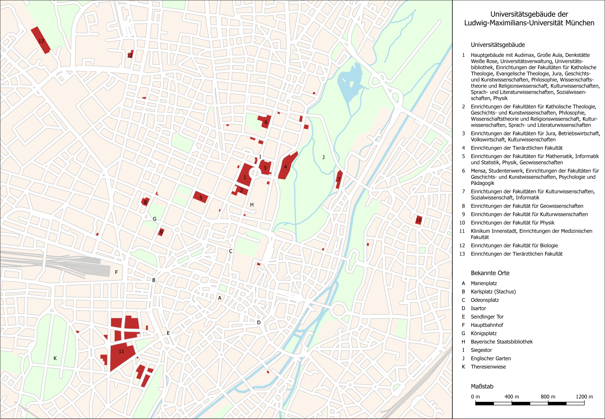 Standortkarte der LMU-Gebäude in München